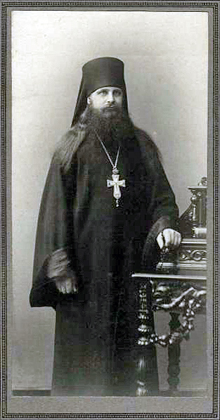 Священномученик Ювеналий (Масловский) в сане архимандрита